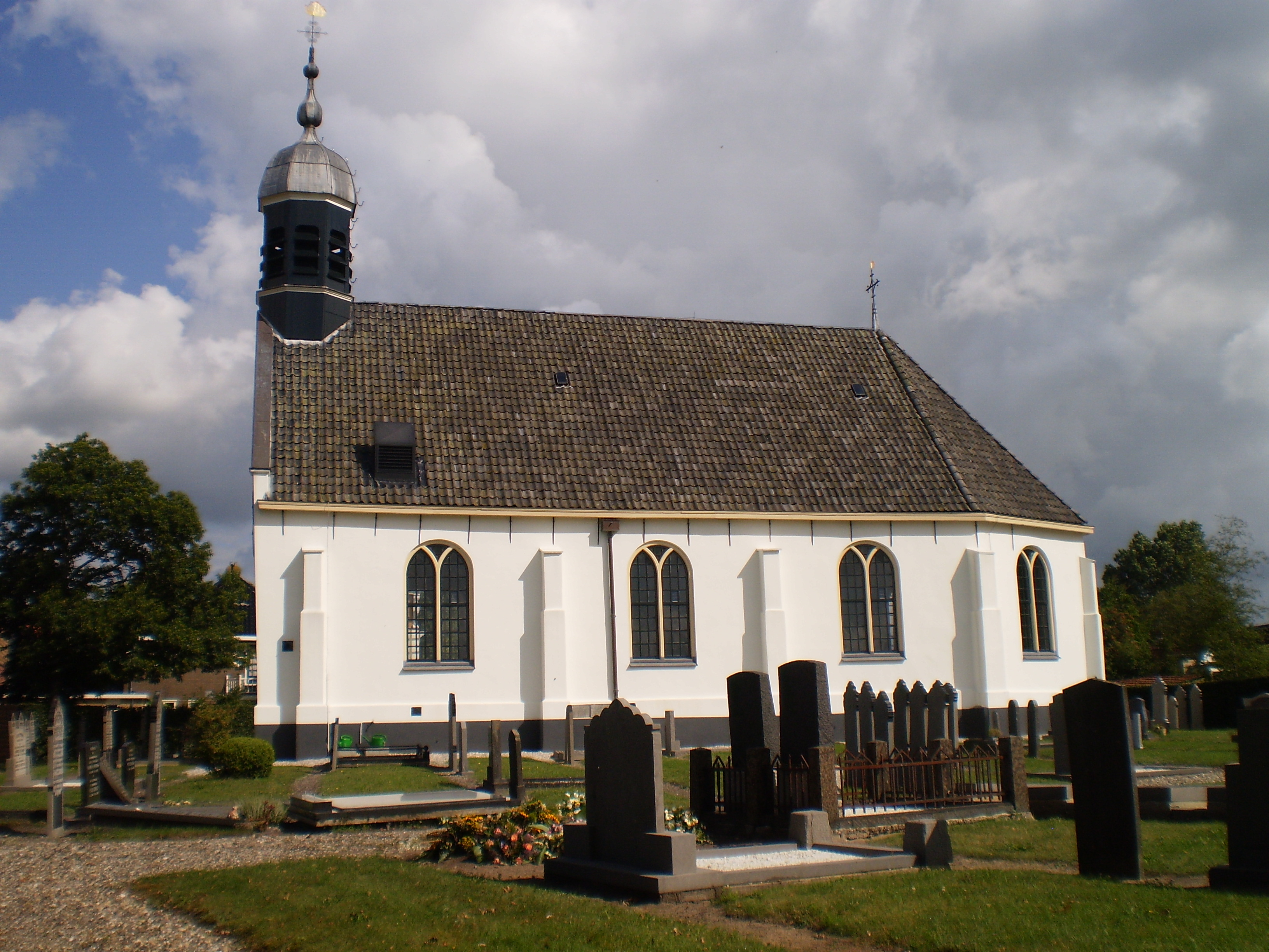 herfoarme tsjerke fan De KNipe oanbean troch Swarte Kees